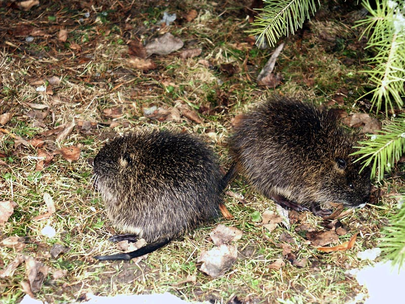 Junge Nutrias im Schwetzinger Schlossgarten